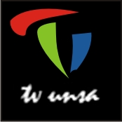 Primer logo de la televisora de la Universidad Nacional de San Agustín